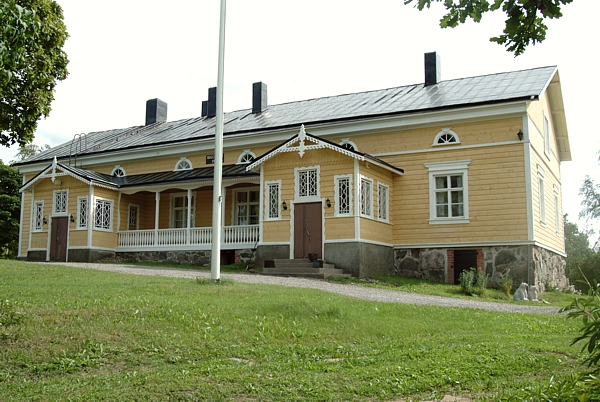 Hirvilahden kartanon päärakennus edestä